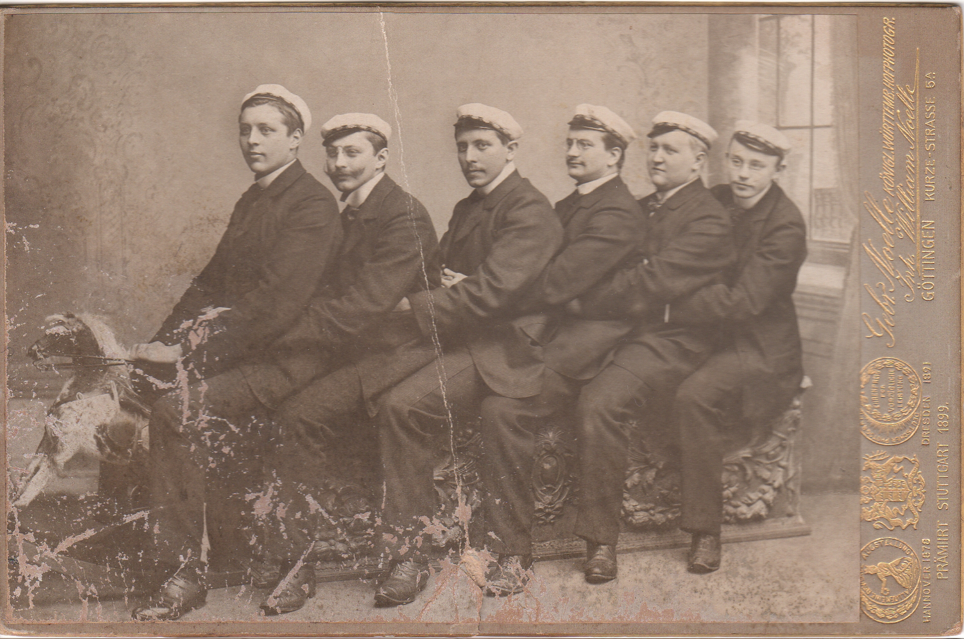 Uttenruthia-Studenten in Göttingen im Wintersemester 1902/03 (Vorderseite). vlnr. NN, Otten, Hans Crusius, Oskar Umland, Karl Burgdorff, Hugo Sievers, Ernst Crusius